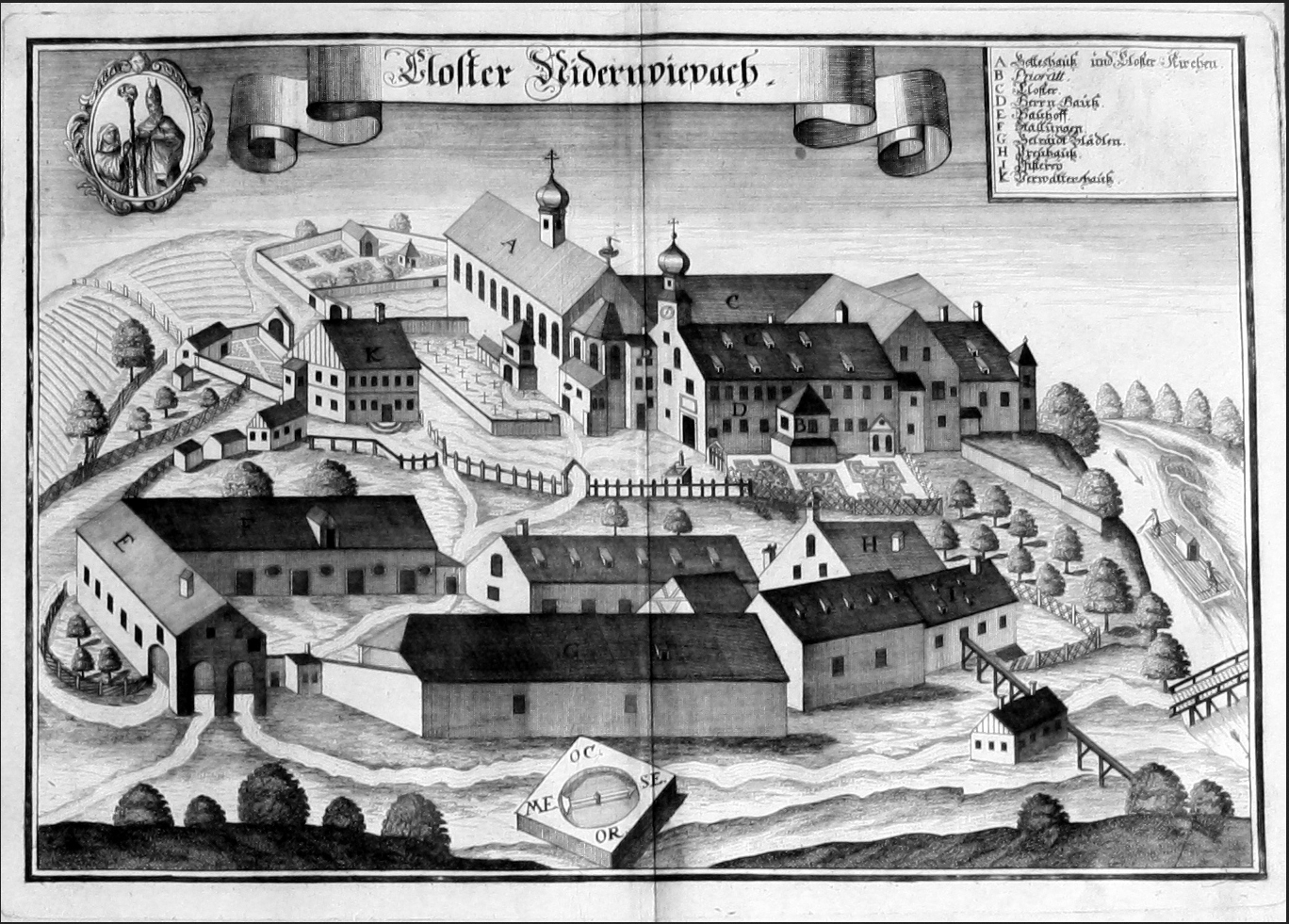 Kupferstich des Klosters Niederviehbach, Landkreis Dingolfing-Landau, Bayern